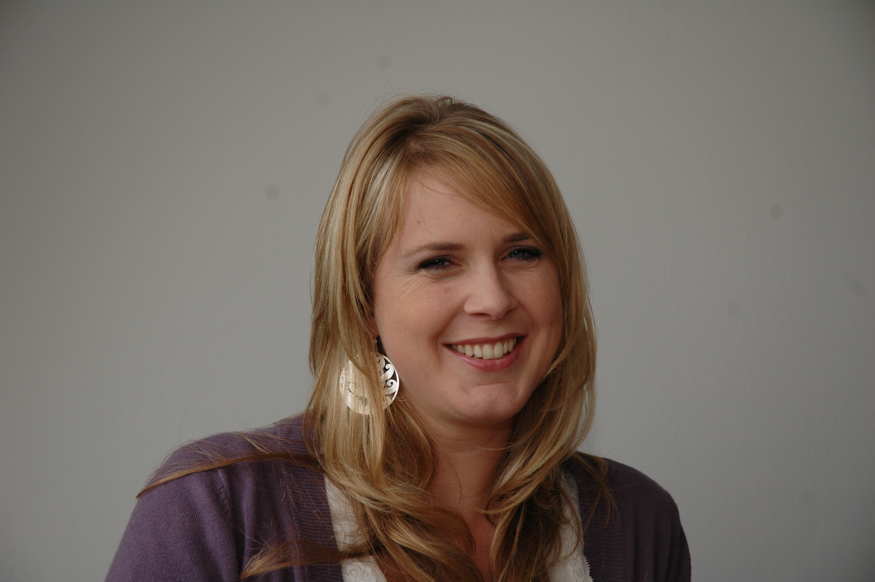 Anja Lehmannj